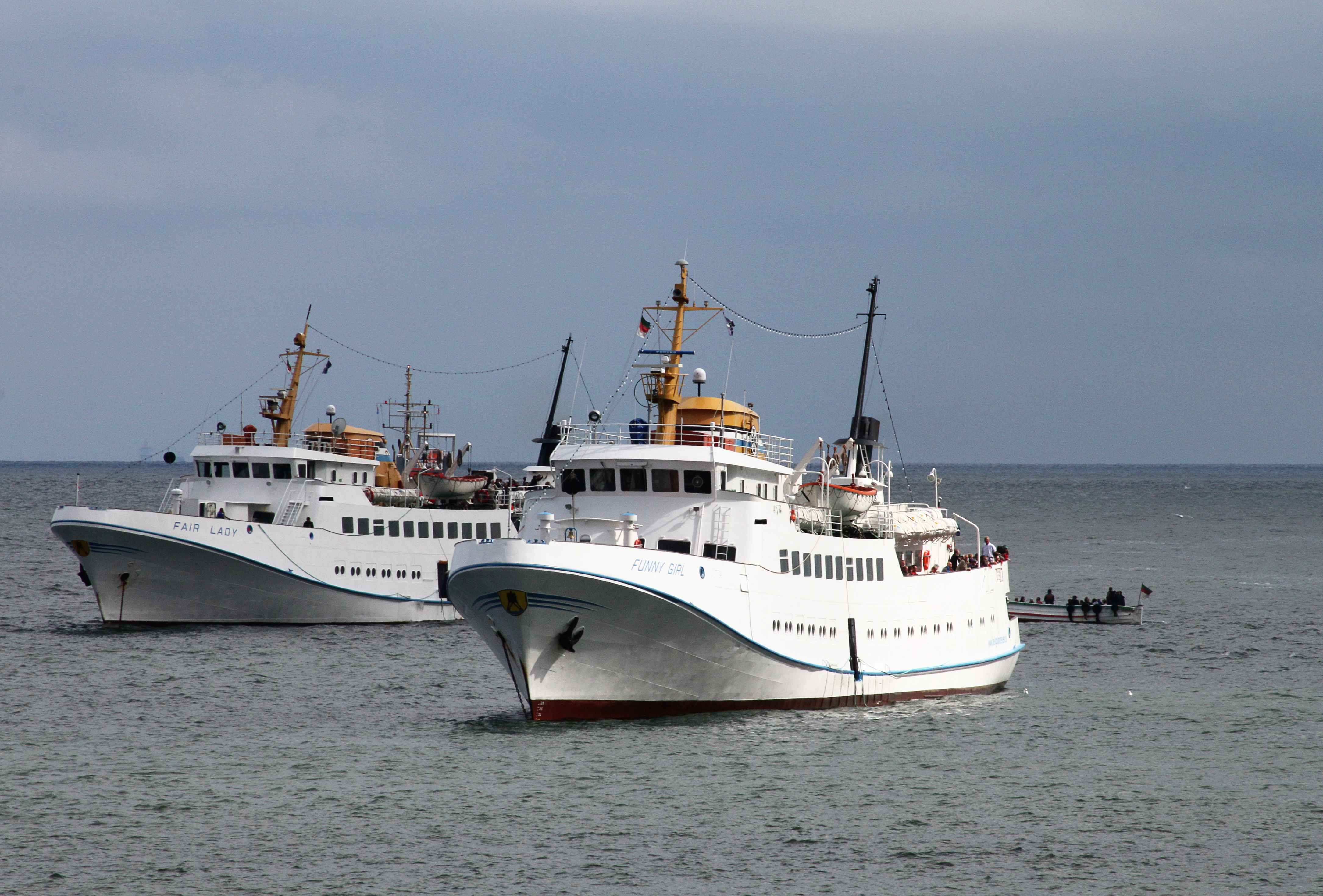 Helgoland; Börtebootregatta